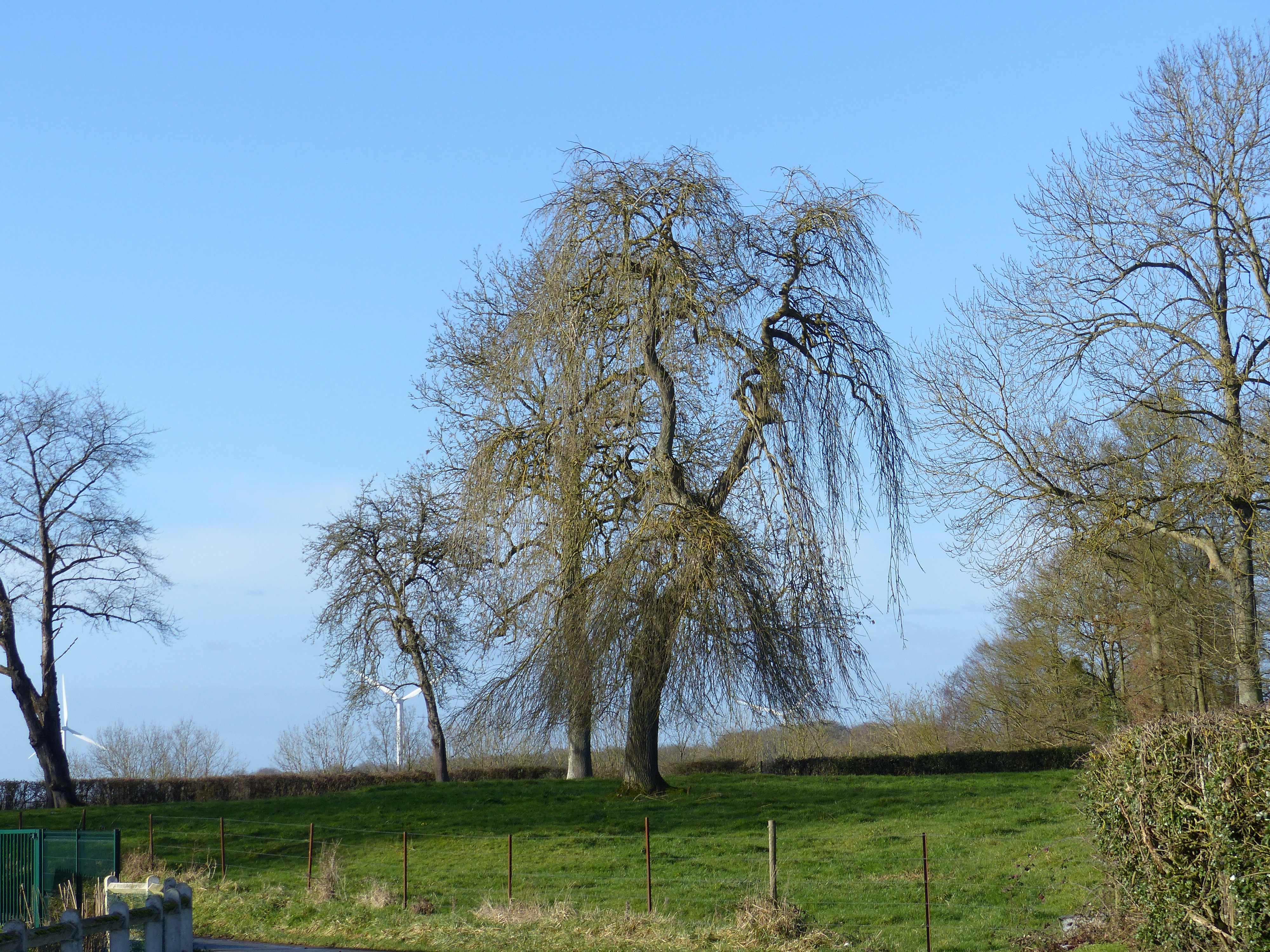 Arbre et éolienne